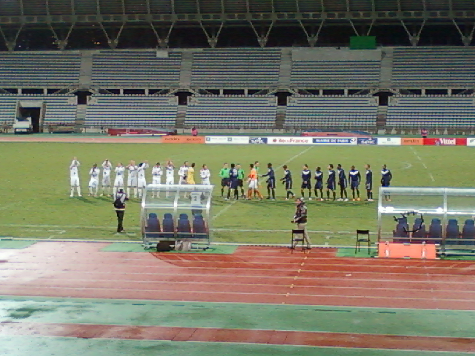 Présentation des équipes lors du match Paris FC - Gazelec Ajaccio le 17 décembre 2011 au stade Charléty.